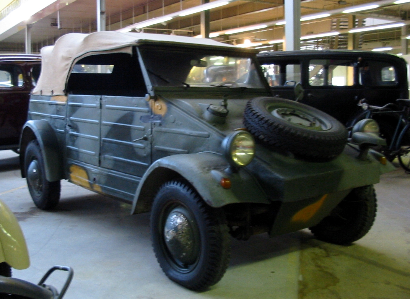 1943 Kübelwagen 25HP 1131cc